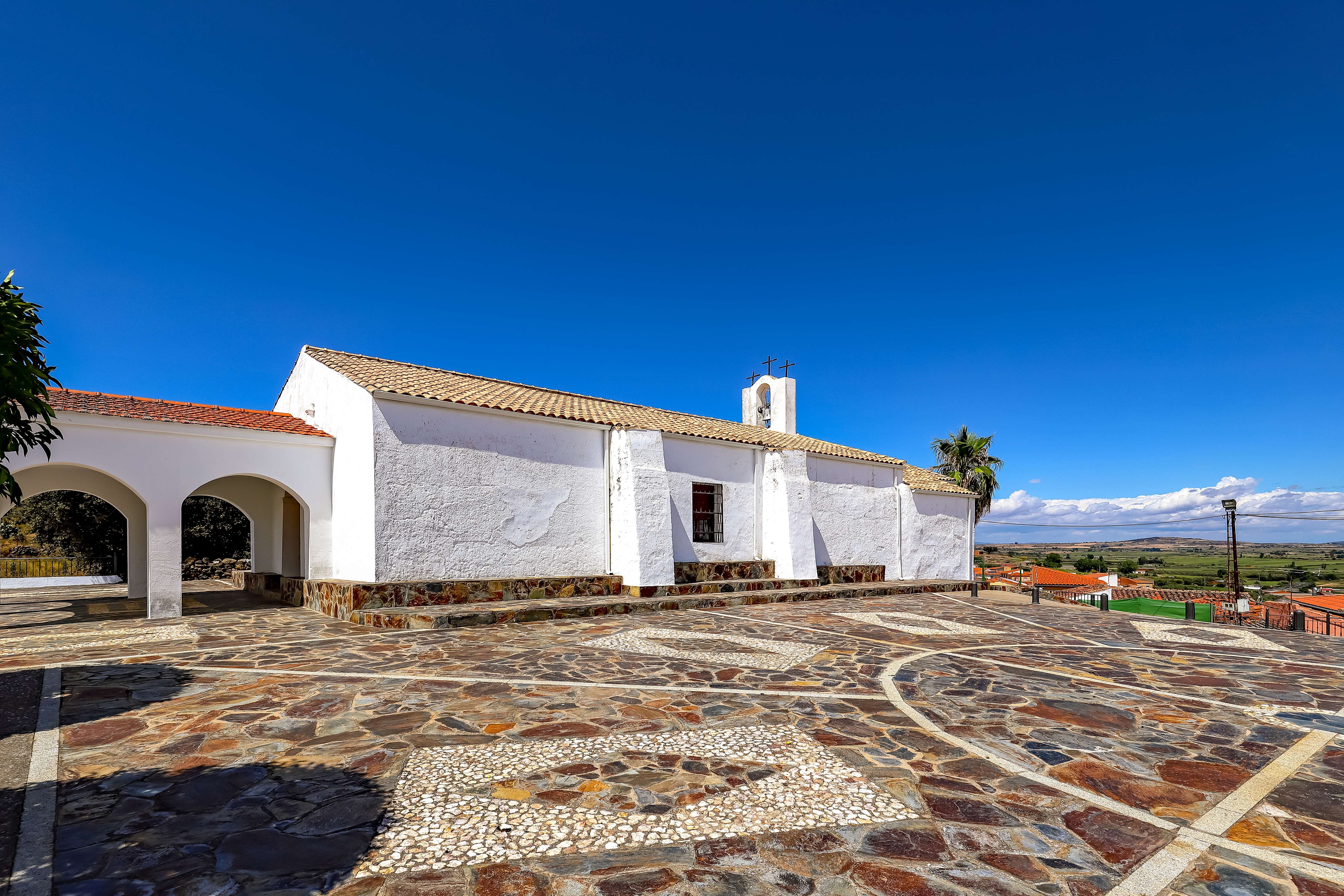 Casillas de Coria es un municipio de la mancomunidad de Rivera de Fresnedosa en la provincia de Cáceres.